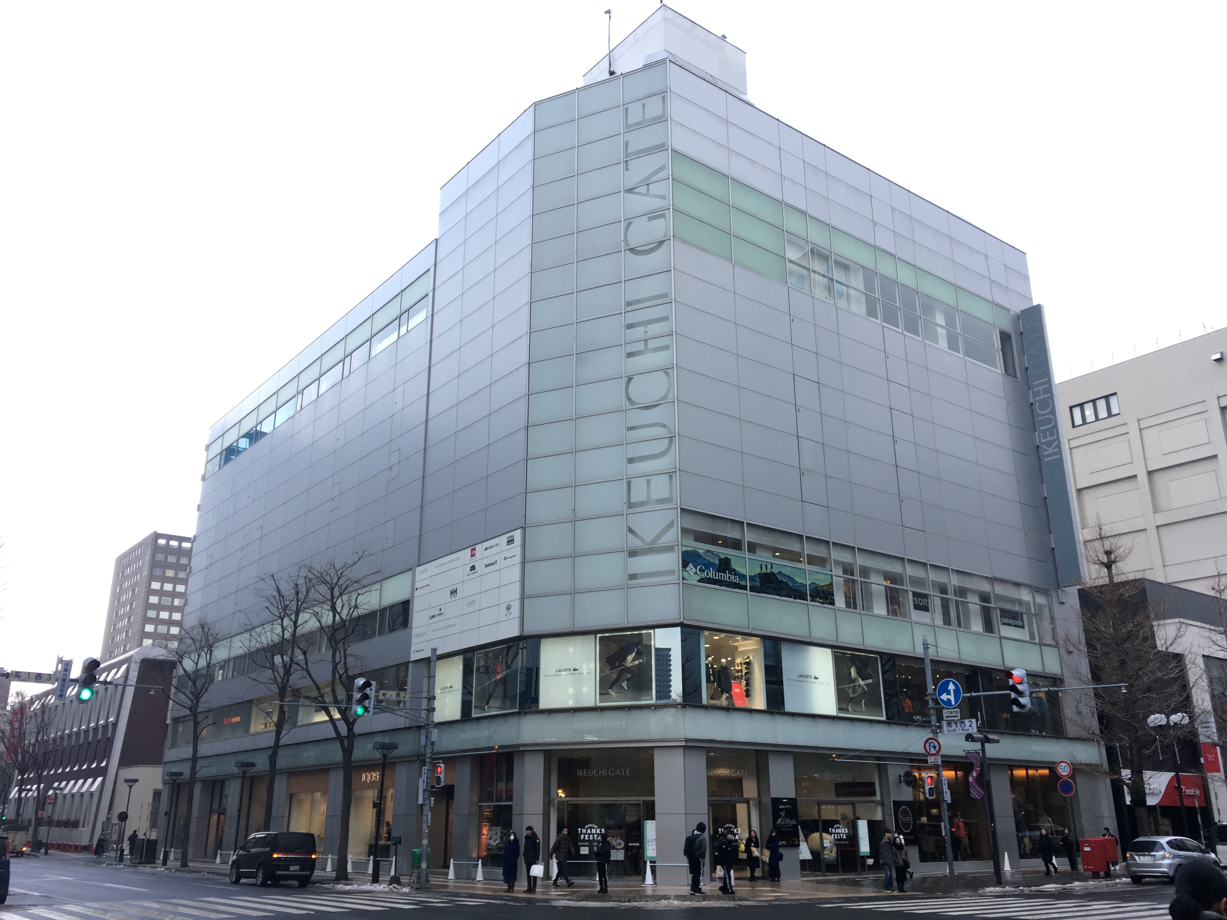 IKEUCHI GATE（札幌市中央区）